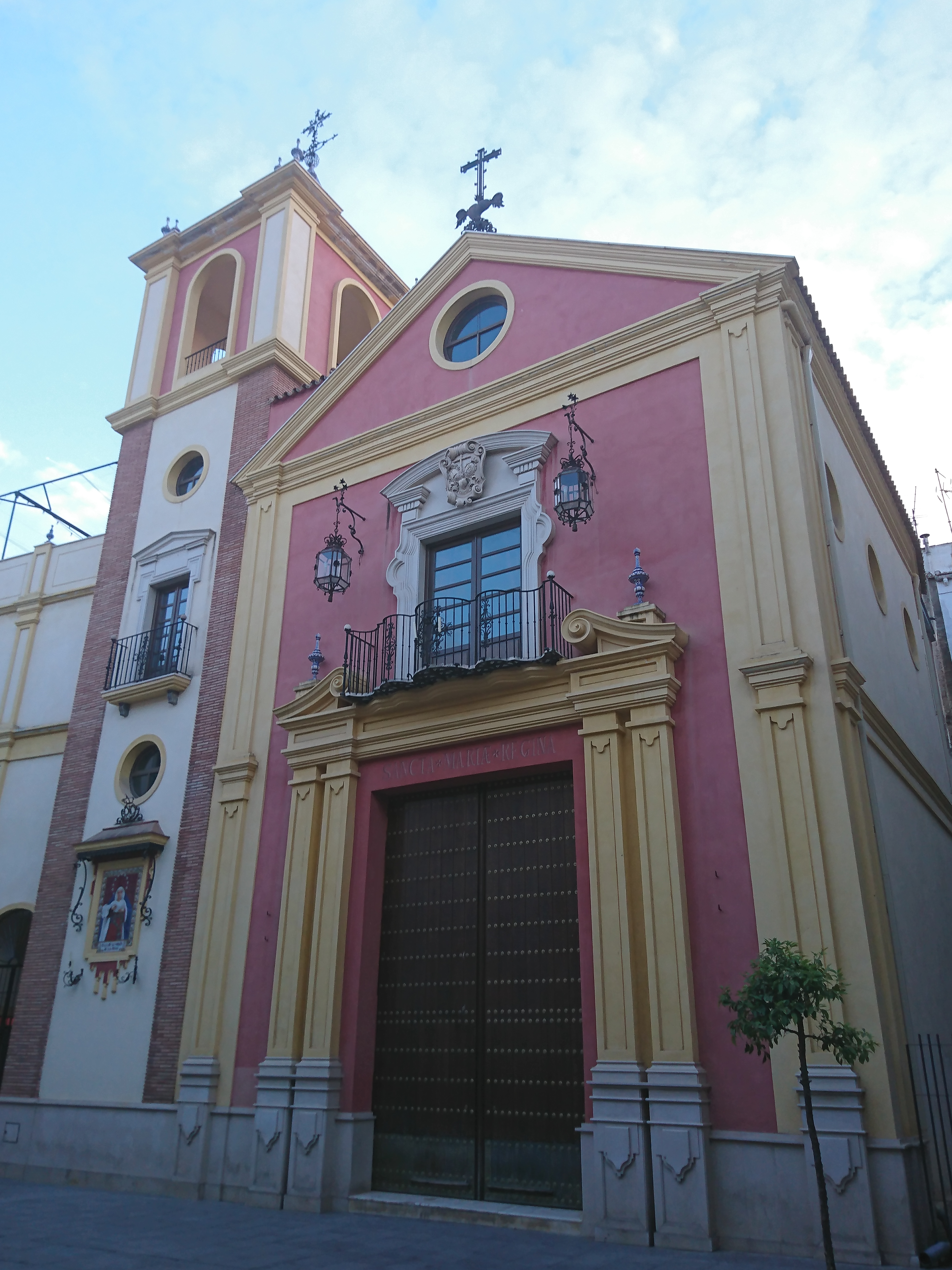 Oratorio de Santa María Reina y Madre